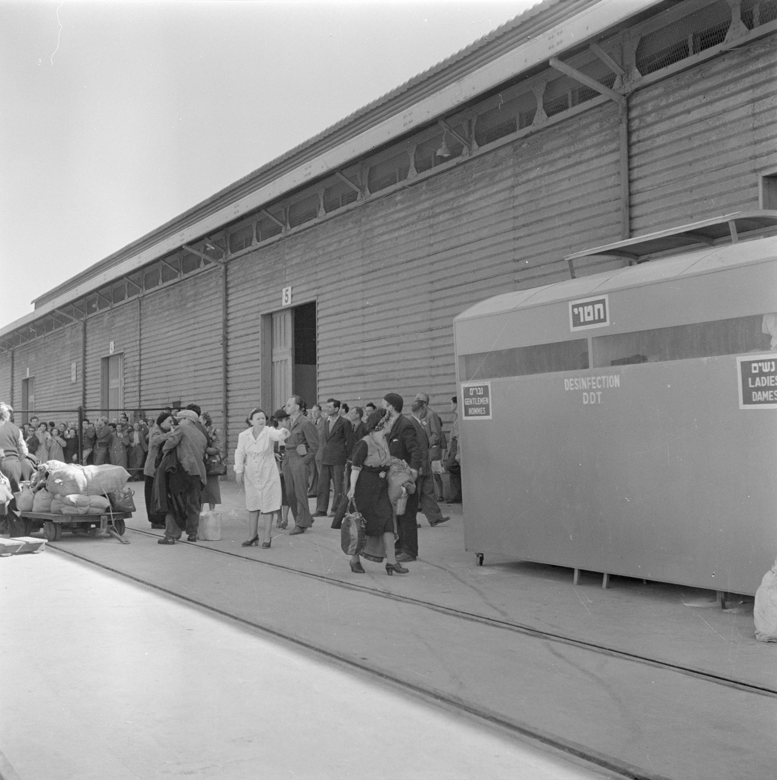 Collectie / Archief : Fotocollectie Van de Poll Reportage / Serie : Israel 1948-1949 Beschrijving : Weerzien op de kade van de haven van Haifa van emigranten (oliem) uit Bulgarije en hun relaties na hun ontscheping van het transportschip Bulgaria. Op de voorgrond een verplaatsbaar toilet Datum : 1948 Locatie : Haifa, Israël Trefwoorden : bagage, emigranten, sanitaire voorzieningen, scheepvaart, vervoermiddelen Fotograaf : Poll, Willem van de Auteursrechthebbende : Nationaal Archief Materiaalsoort : Negatief (zwart/wit) Nummer archiefinventaris : bekijk toegang 2.24.14.02 Bestanddeelnummer : 255-1151